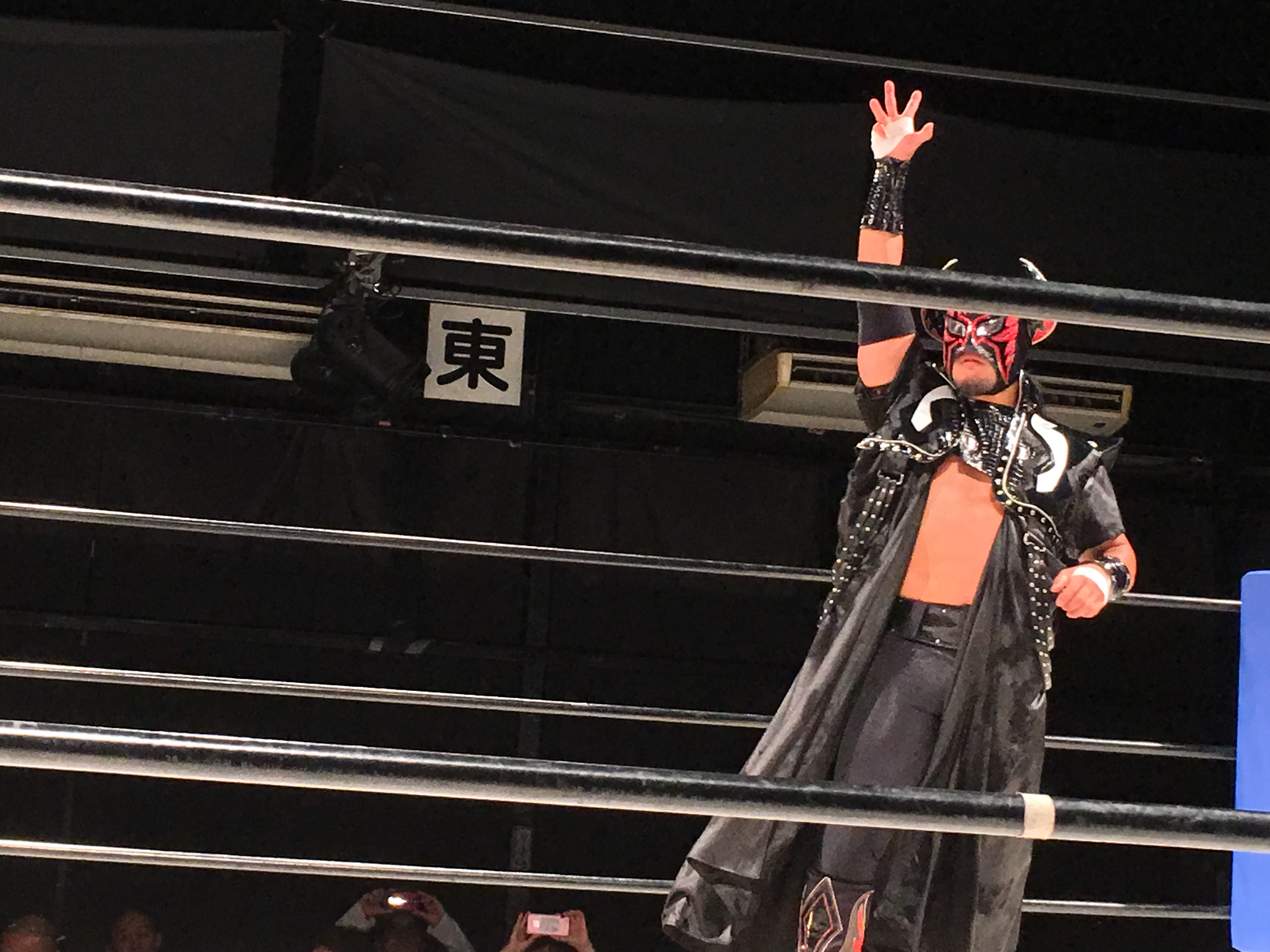 バッファロー（その2）